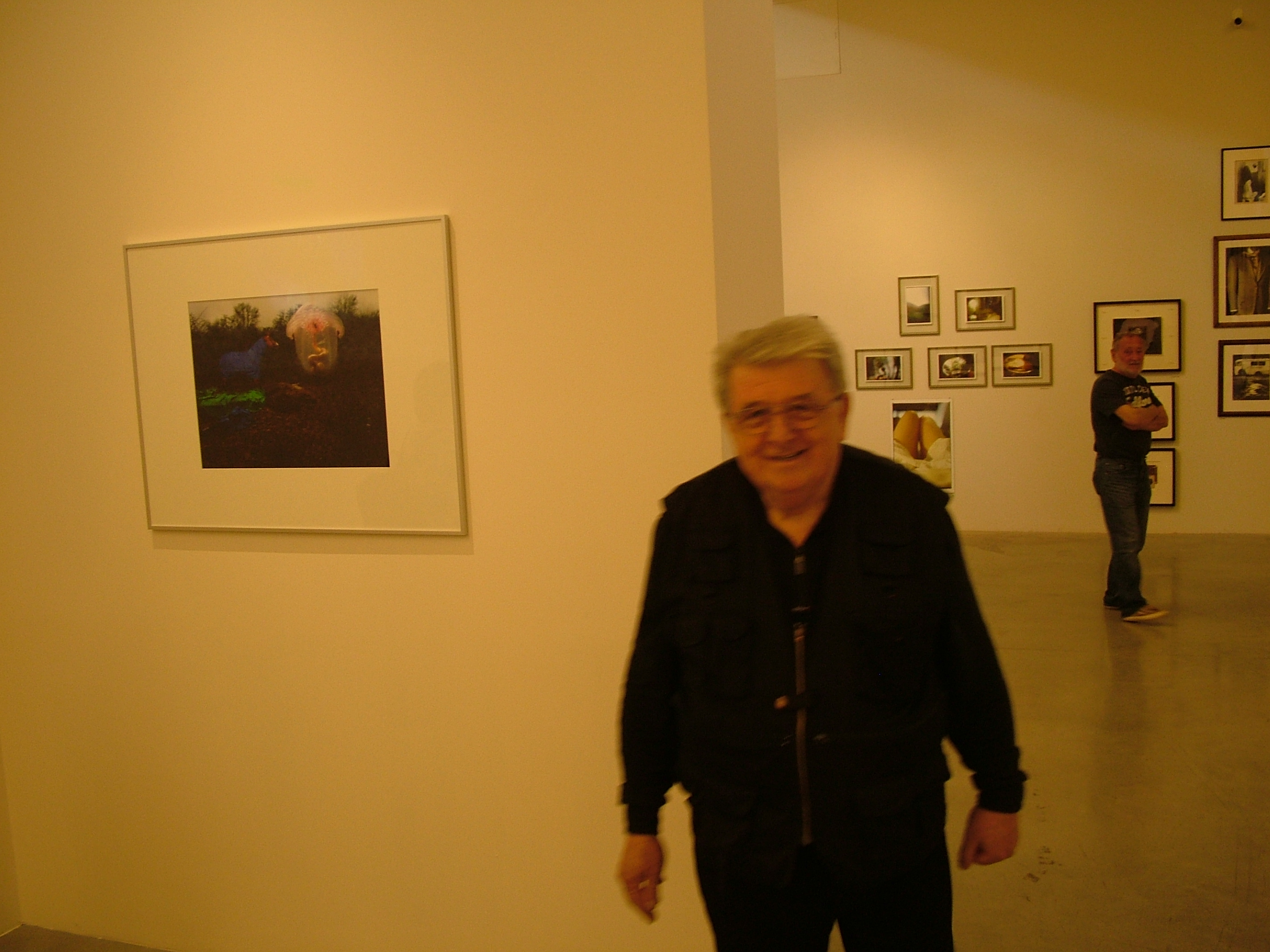 Prague Photo Festival 2012